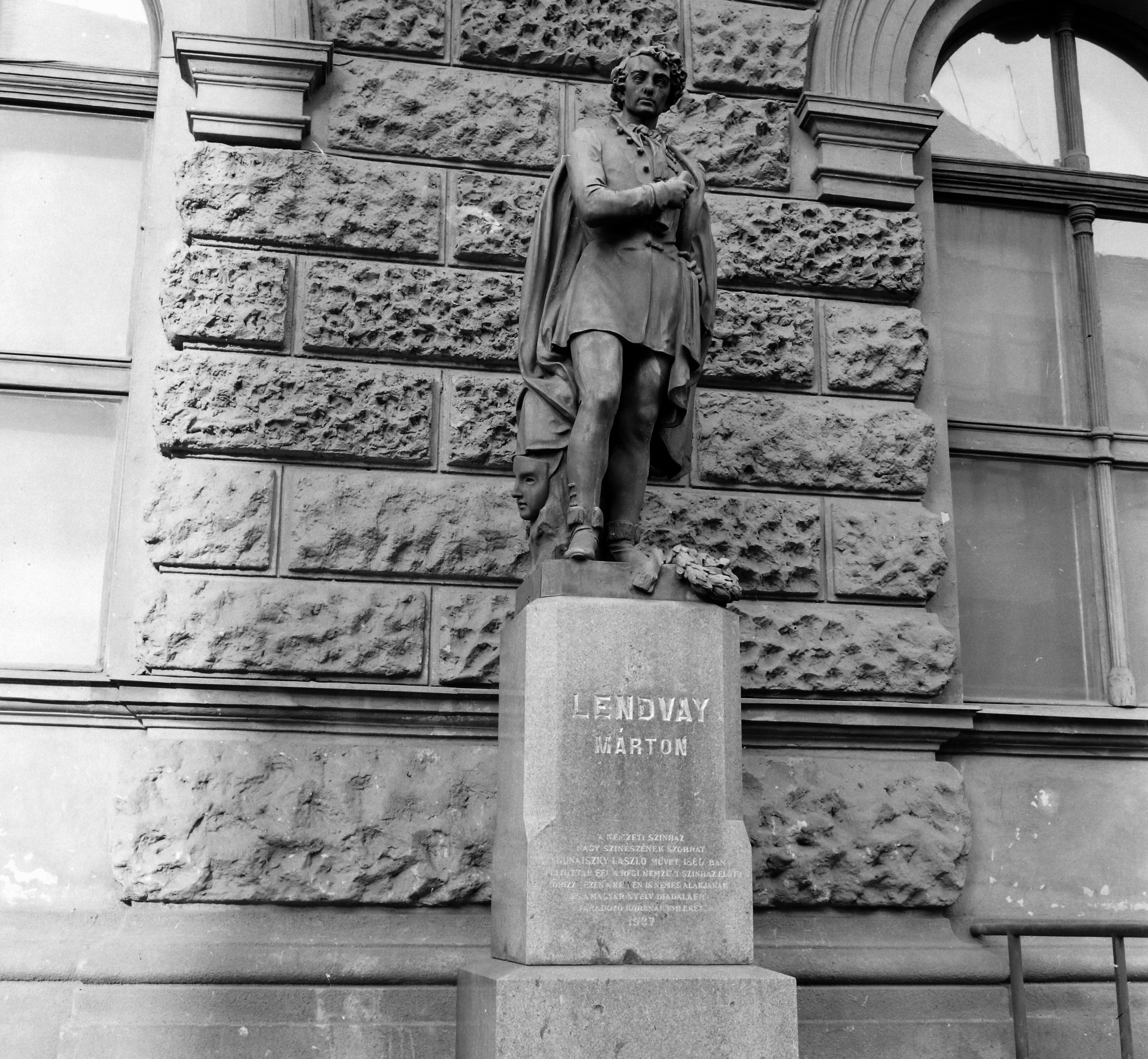 Blaha Lujza tér, Lendvay Márton szobra (Dunaiszky László, 1860.) a Nemzeti Színház mellett. Location: Hungary, Budapest VIII. Tags: sculpture, history of theater, Budapest, Lendvay Márton-portrayal Title: Blaha Lujza tér, Lendvay Márton szobra (Dunaiszky László, 1860.) a Nemzeti Színház mellett.